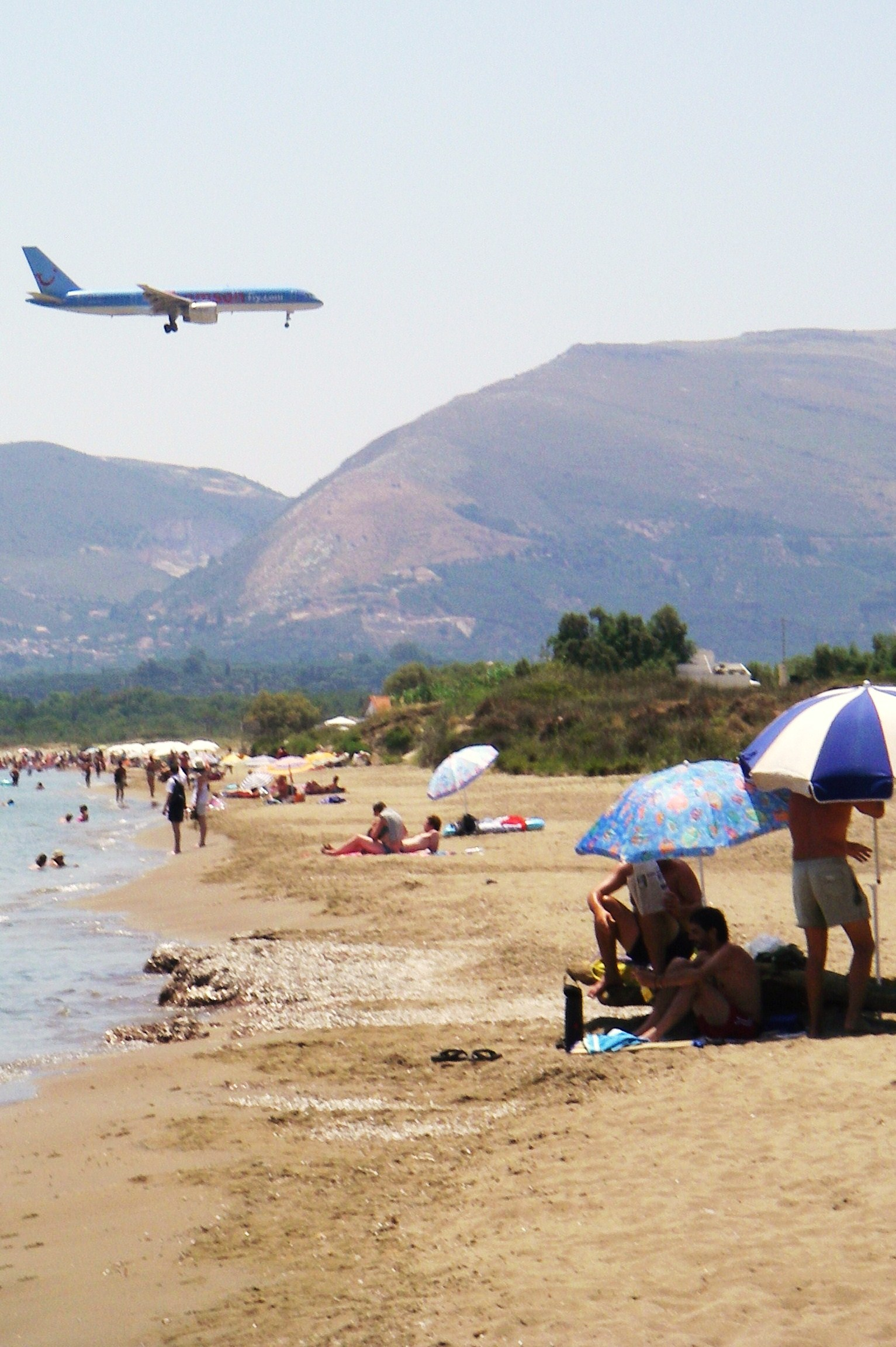 Kalamaki beach